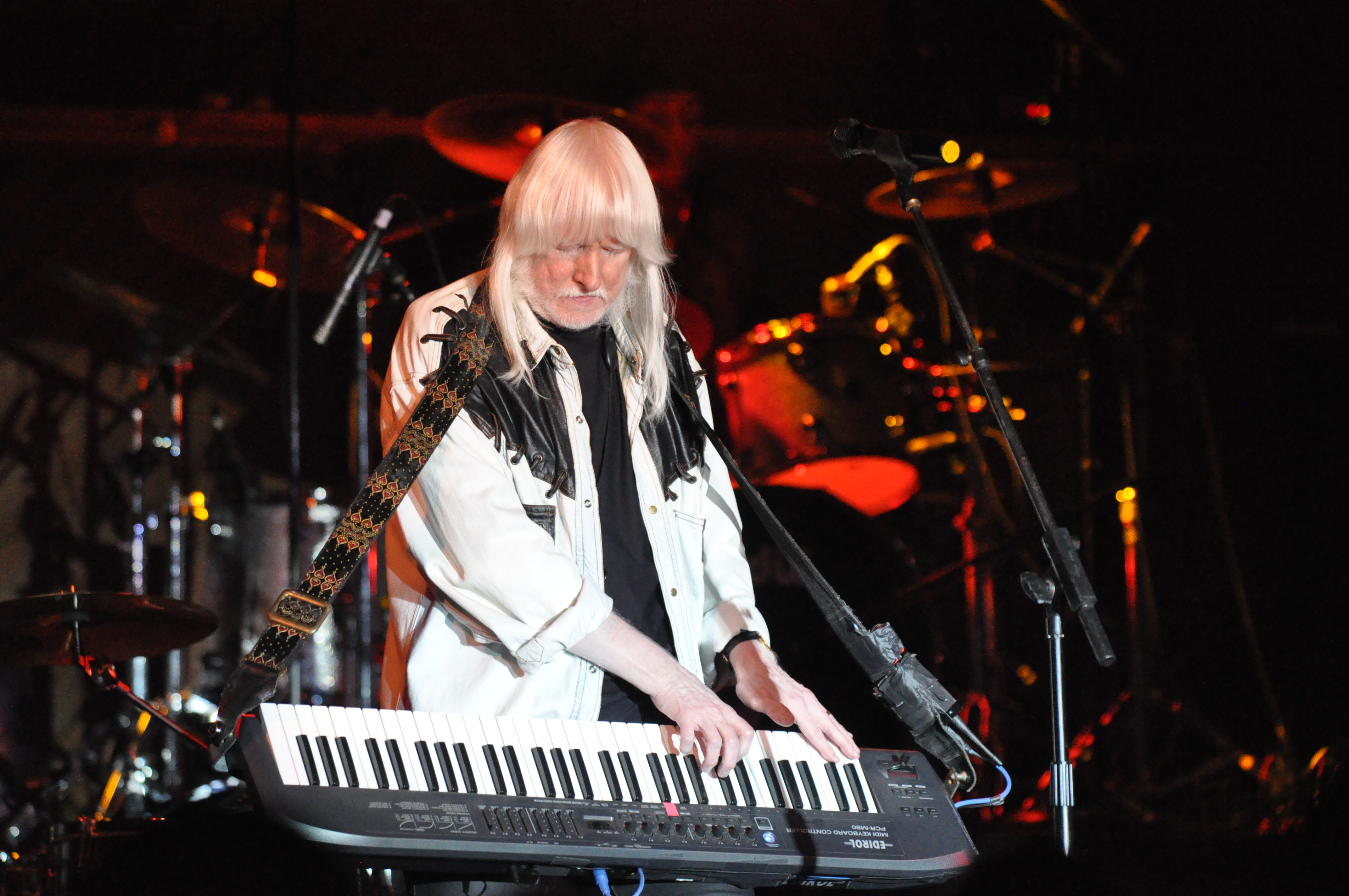 Edgar performs "Frankenstein"